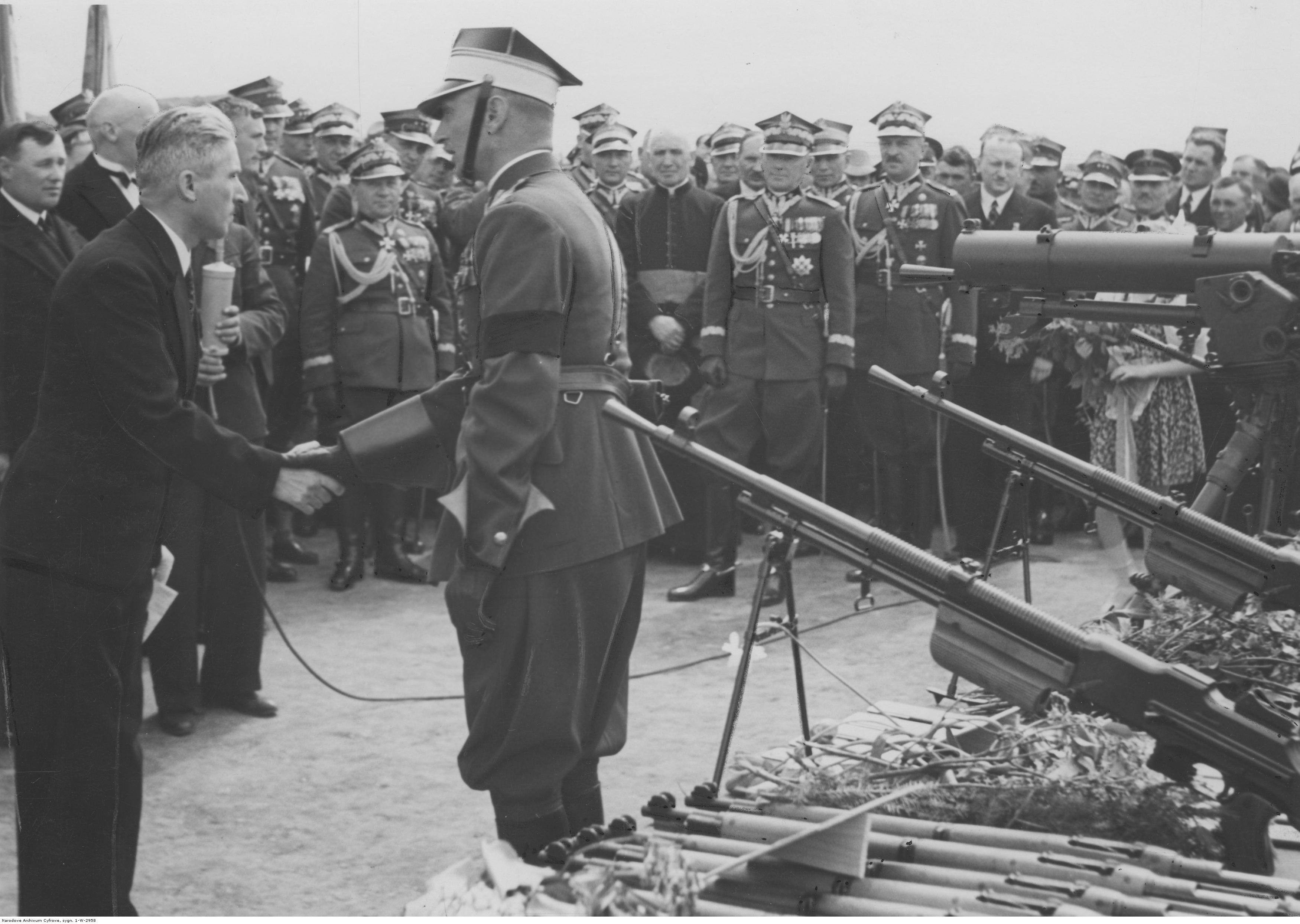 Przewodniczący komitetu uroczystościowego przekazuje ufundowany sprzęt wojskowy: karabiny Mauser wz. 98a, ręczne karabiny maszynowe Browning wz. 1928, ciężki karabin maszynowy Browning wz. 30 na podstawie kawalerii wz. 36, podczas święta pułkowego. W uroczystosci wzięli udział, m.in.: marszałekm Edward Rydz-Śmigły (w środku), gen. bryg. Janusz Głuchowski (obok marszałka), gen. bryg. Mieczysław Ryś-Trojanowski (z lewej). [opis oryginalny]